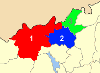 Χάρτης των ενοτήτων (και πρώην δήμων) από τις οποίες αποτελείται ο Δήμος Μουζακίου